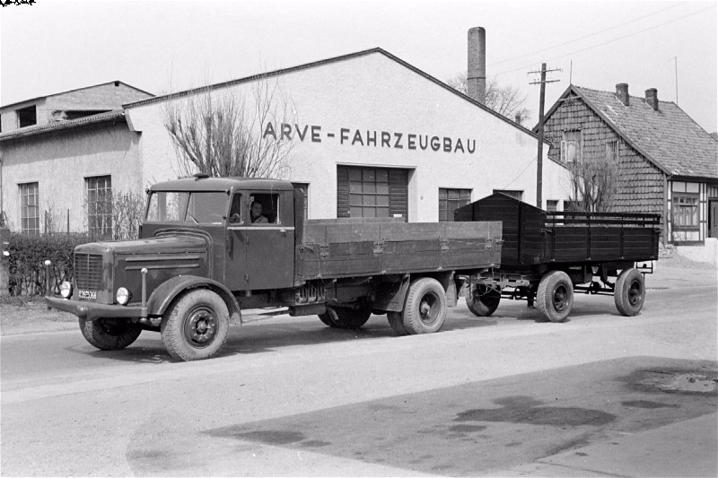 Diese 1950 datierte Aufnahme aus dem Nachlass des Fotografen Gerhard Dierssen zeigt einen Lastkraftwagen mit Anhänger vor dem Gebäude der Firma Arve-Fahrzeugbau in Springe. Das Digitalisat wurde am 27. Juni 2017 erstmals vom Bildarchiv der Region Hannover (Signatur ARH NL Dierssen 1015/0028) der Öffentlichkeit in "Bildschirmqualität" zur Verfügung gestellt mit der Lizenz CC BY-SA 3.0 ...